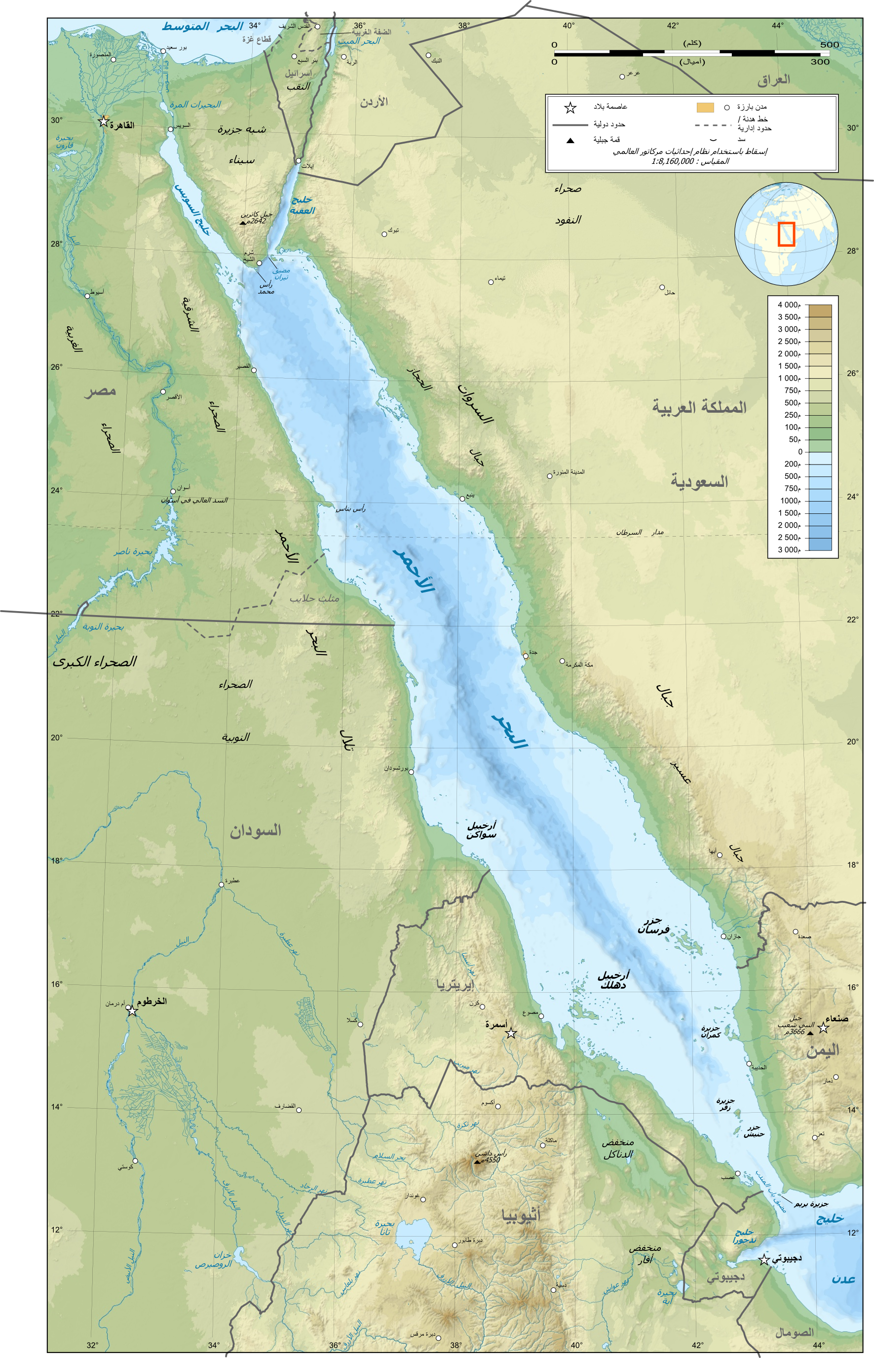 خريطة طوبوغرافية باللغة العربية للبحر الأحمر.